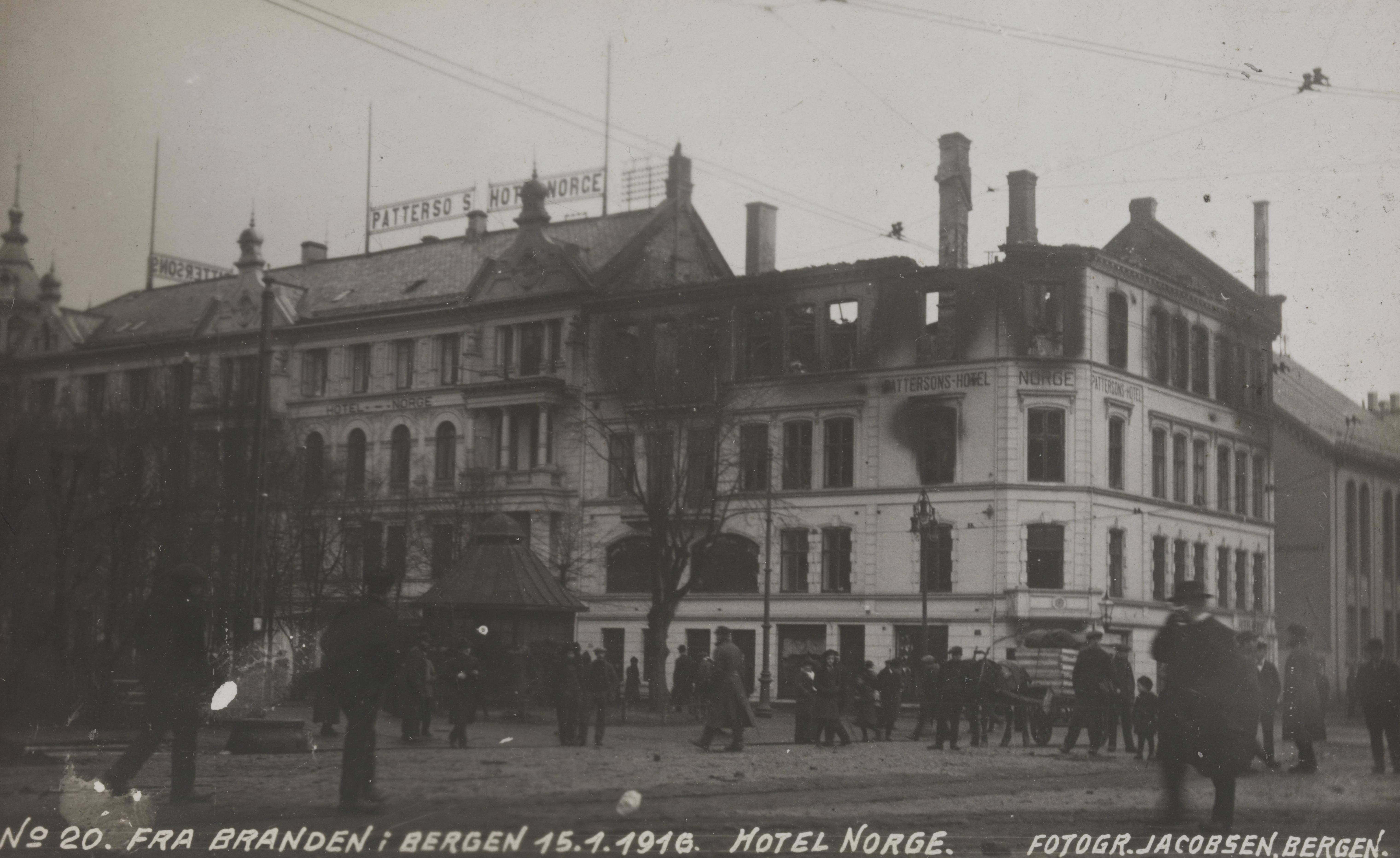 Bildet er hentet fra Nasjonalbibliotekets bildesamling Bergen, Hordaland